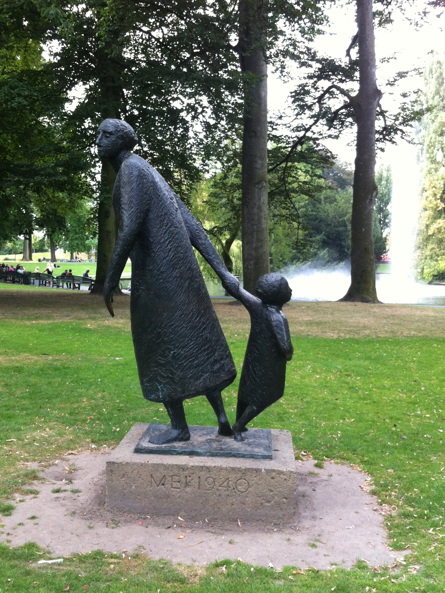 Brozen beeld ter herinnering aan de vlucht van de Bredanaars, tijdens het begin van de Tweede Wereldoorlog (mei 1940), gemaakt door Hendrik (Hein) Koreman in 1954. Oorspronkelijk geplaatst in Breda voor (de nu afgebroken) Maria Hemelvaart kerk, op de hoek van de Houtmarkt - Ginnekenstraat. Nu (2012) staand in Breda in het Valkenberg